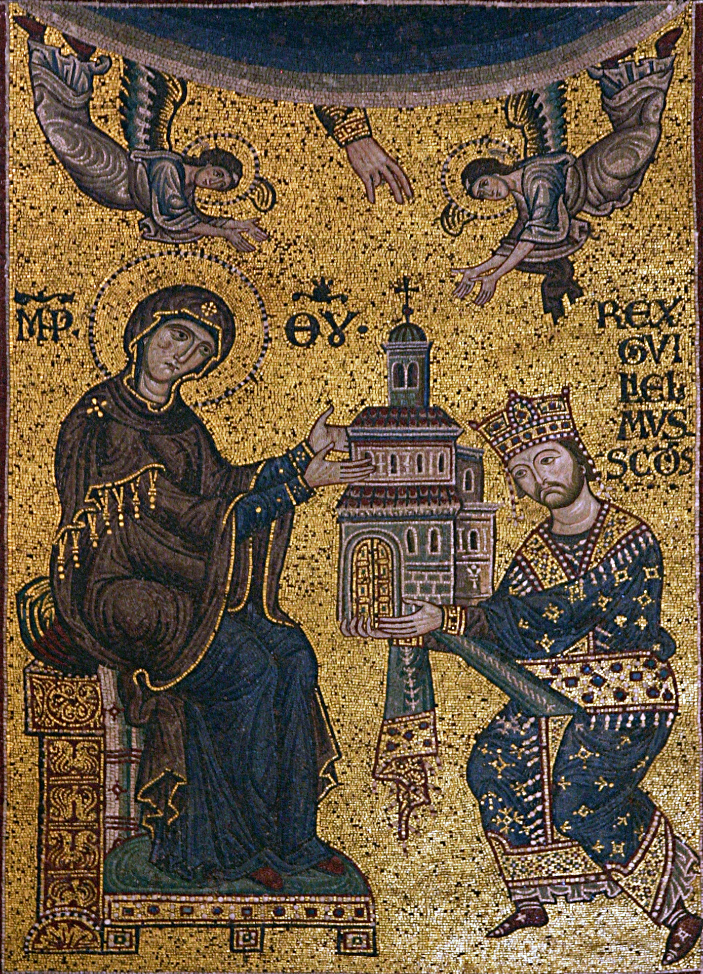 Cathedral of Monreale